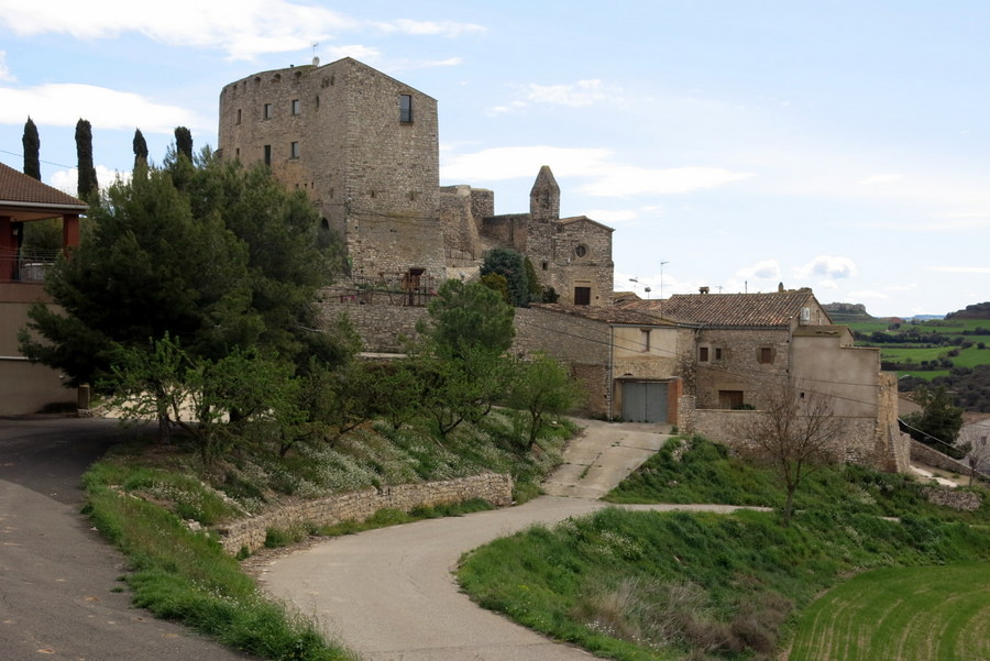 Castell de Fonolleres (Segarra) - Catalunya